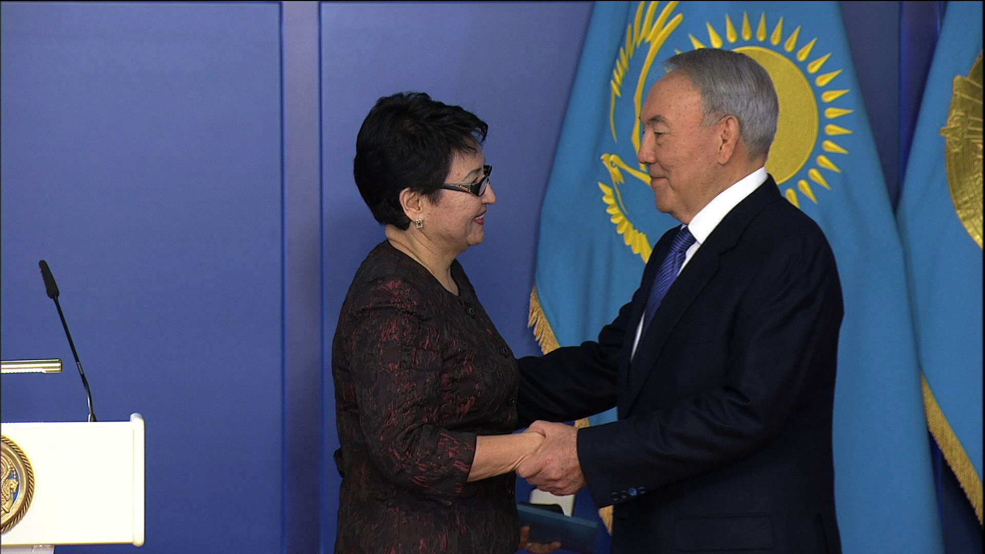 В 2014 году за «Реквием» композитор удостоился Лауреата Государственной премии Республики Казахстан.